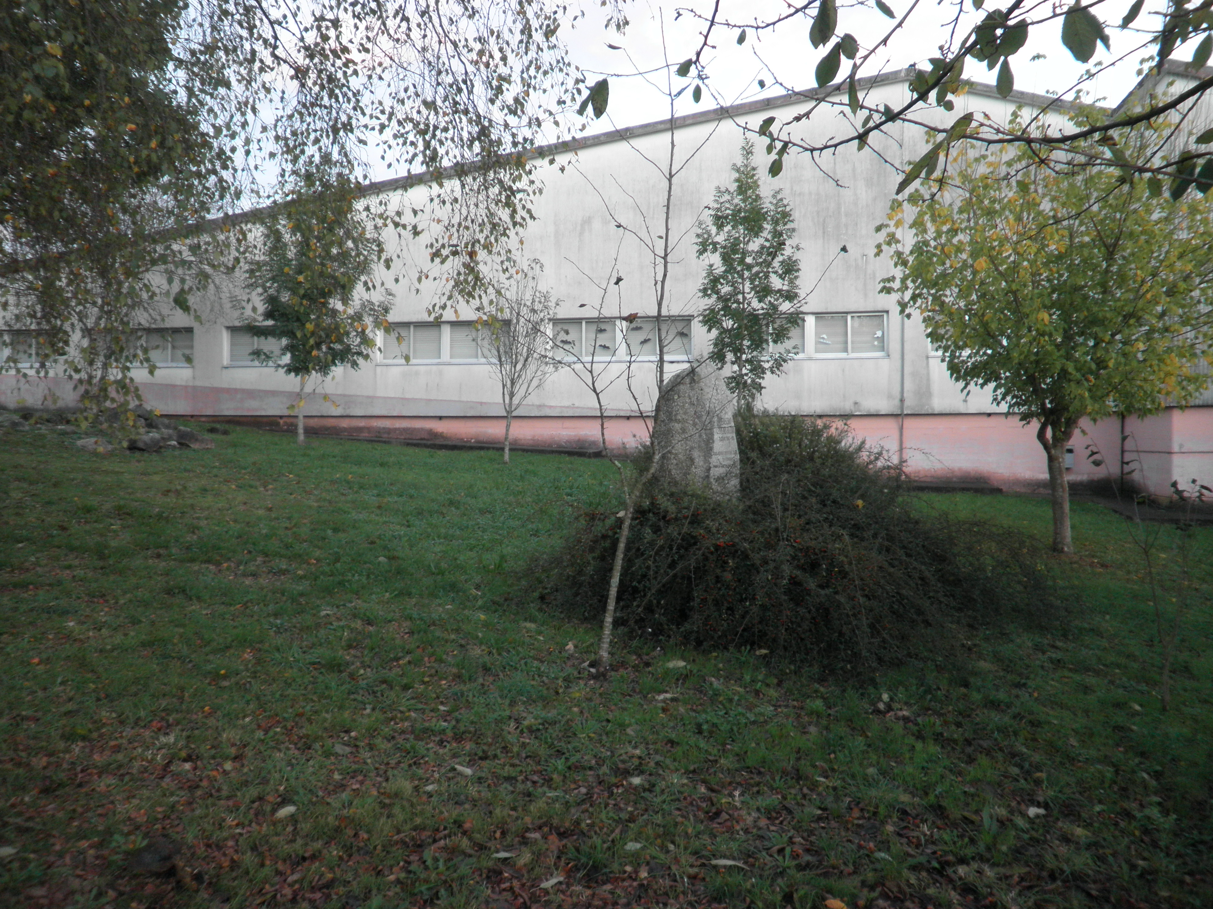 C.P.I. Eusebio Lorenzo Baleirón de Dodro.